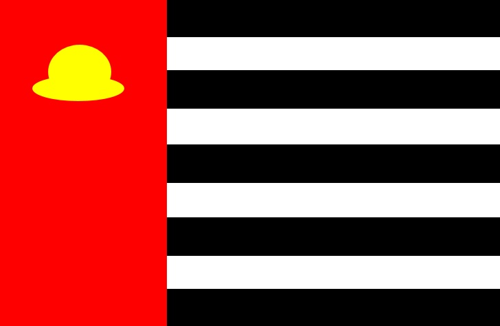 De vlag van de gemeente Hoedekenskerke